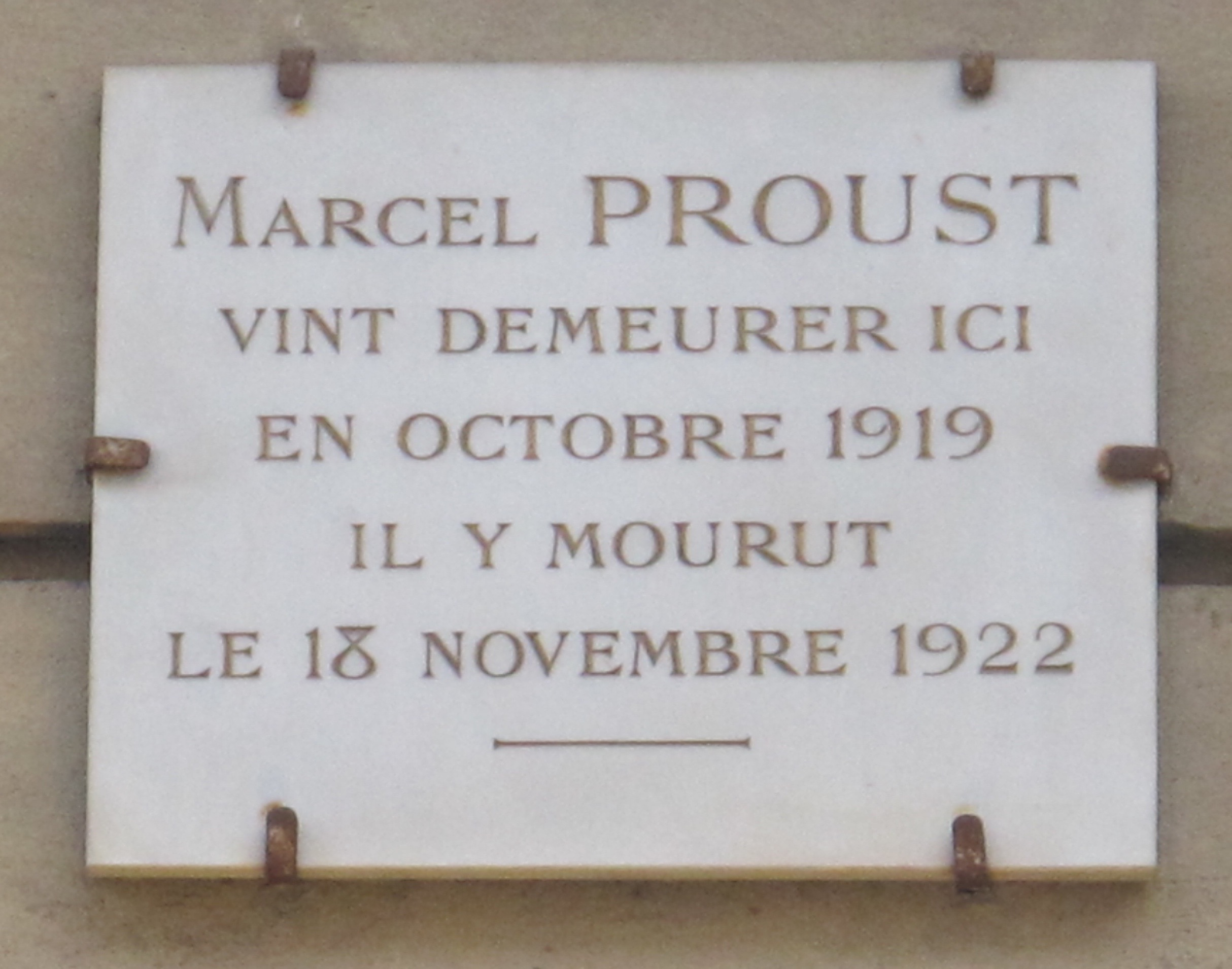 Plaque en hommage à Marcel Proust, 44 rue de l'Amiral-Hamelin (Paris, 16e).